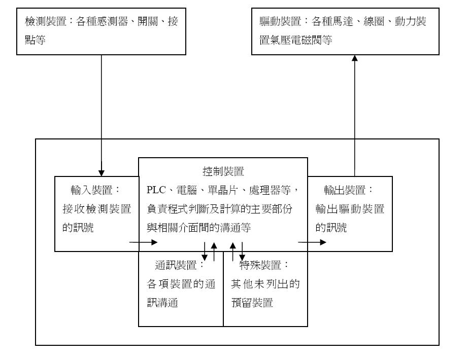 make it self (word)